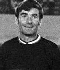 Stadium municipal de Toulouse, 1bis allées Gabriel-Biénès. 22 Septembre 1970. Vue des anciens joueurs de l'équipe de France lors de la coupe du monde en Suède en 1958 et des anciens du Toulouse Football Club : Pierre Bernard, Jean-Jacques Marcel, Richard Boucher, Jean Wendling, Henri Biancheri, Pierre Dorsini, J. Bernard, Yvon Douis, Just Fontaine, Raymond Kopa, Roger Piantoni, Paul Sauvage